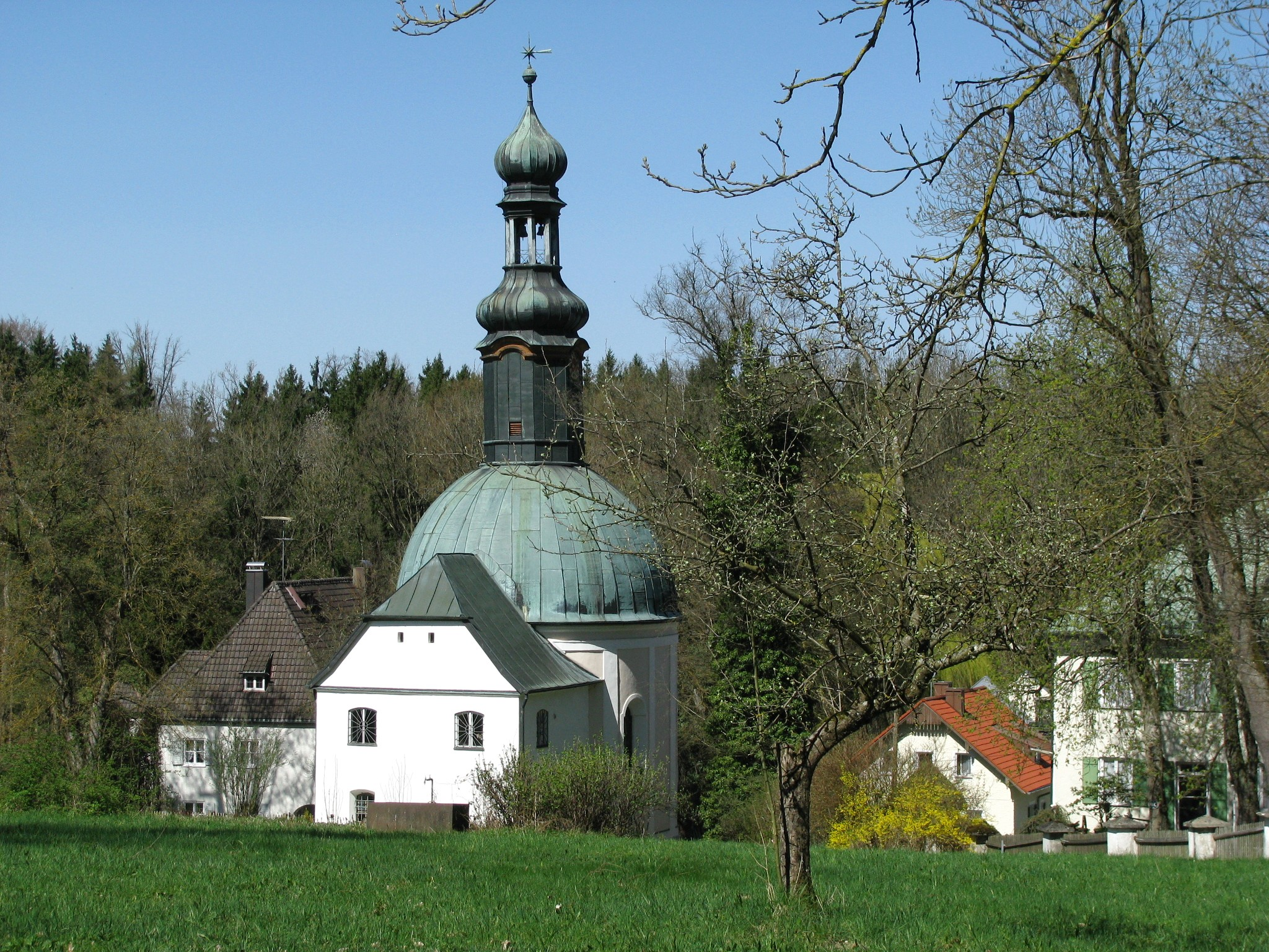 Mariabrunn im Landkreis Dachau